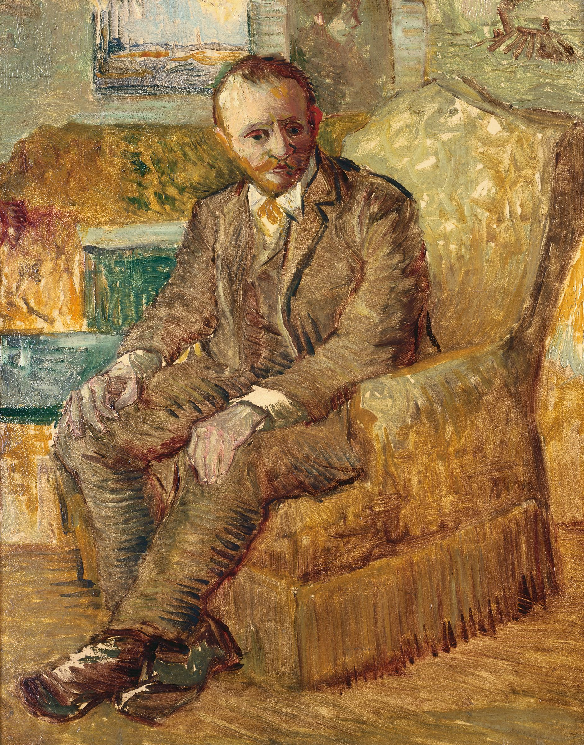 Tableau de Van Gogh peint vers 1886-1887